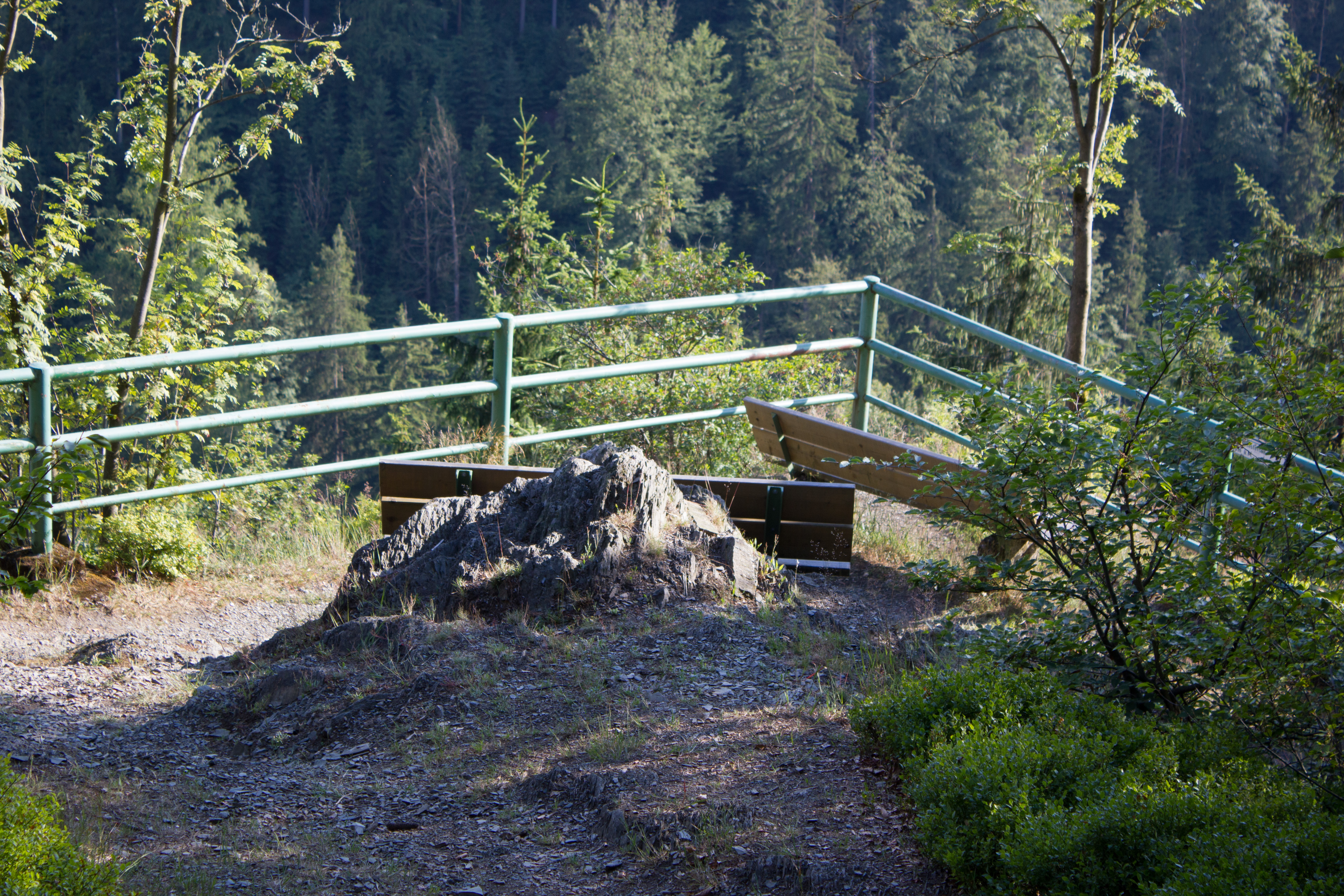 Kämmleinsfelsen südwestlich von Geroldsgrün, Geotop 475R002